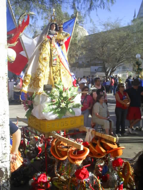 Virgen del Carmen en La TiranaLa Tirana 2006